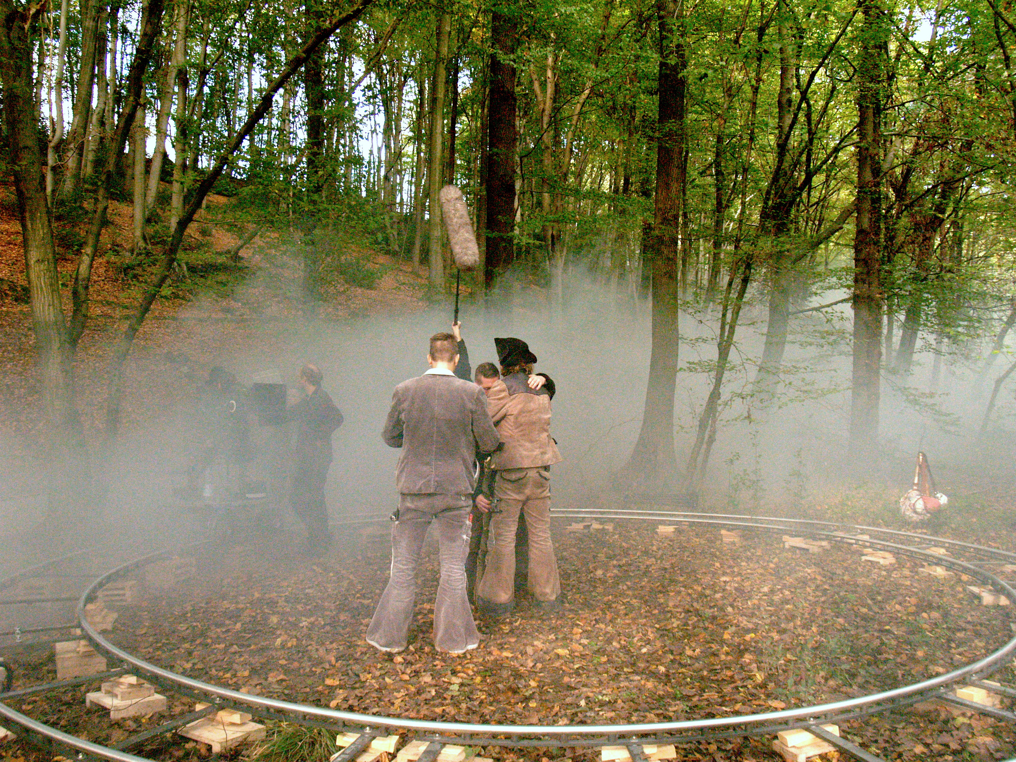 Dreharbeiten zu "Für den unbekannten Hund" in einem Waldstück bei Köln mit Lukas Steltner und FerrisMC im Oktober 2005